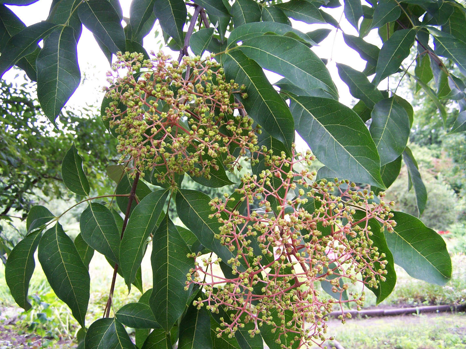 Tetradium daniellii (Benn.) T. G. Hartley (syn. Evodia hupehensis per USDA)[1] pl. ewodia hupejska